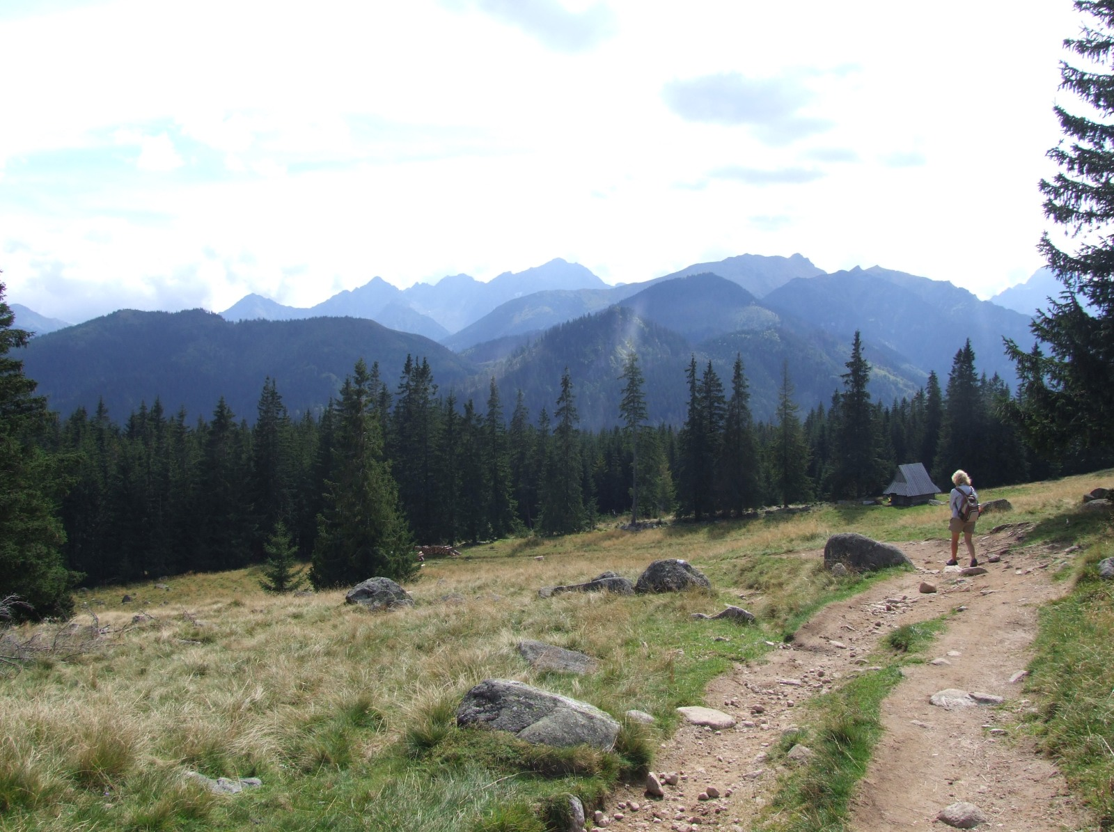 Rusinowa Polana